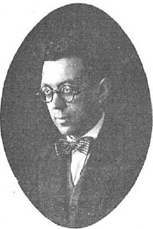 Fotografía del periodista y crítico cinematográfico Mateo Santos publicada en 1926 por la revista de la que era director.